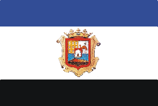 Escudo del municipio de Tinajo en Lanzarote